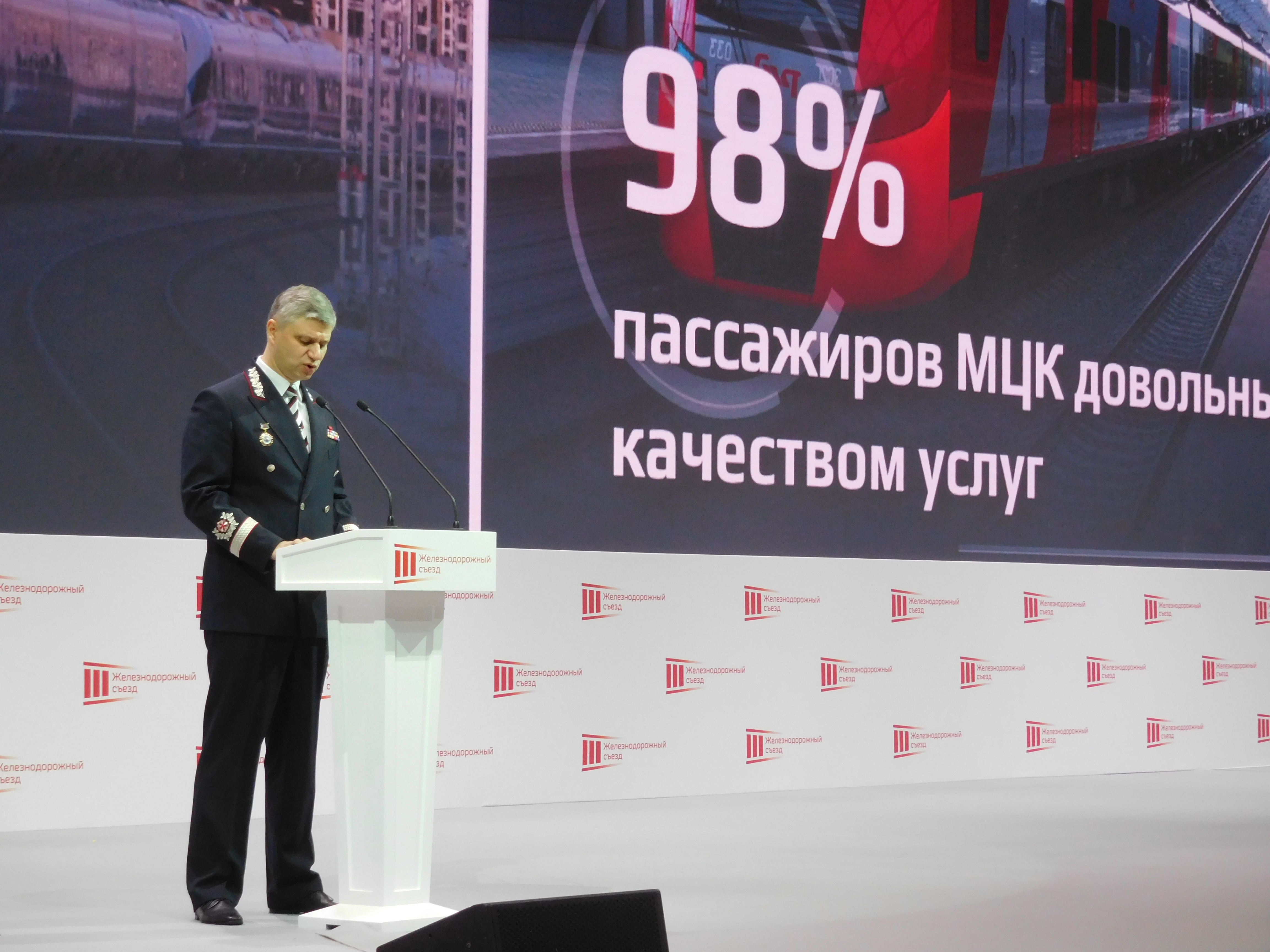 Выступление генерального директора – председателя правления ОАО «РЖД» Белозёрова О. В. «Ключевые итоги деятельности и инновационное развитие холдинга «РЖД».